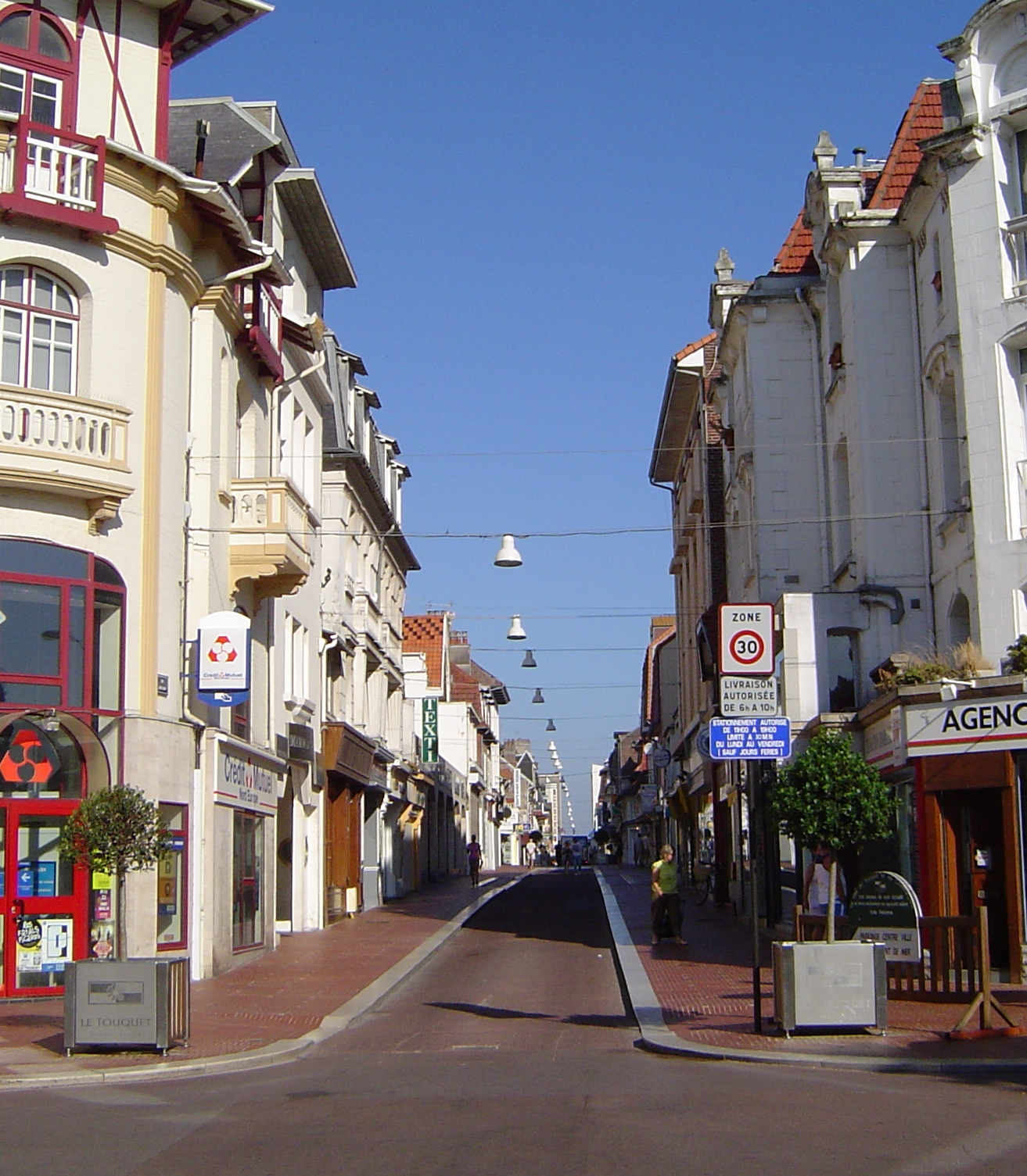 Photo prise par moi-même au Touquet le 15 juillet 2006